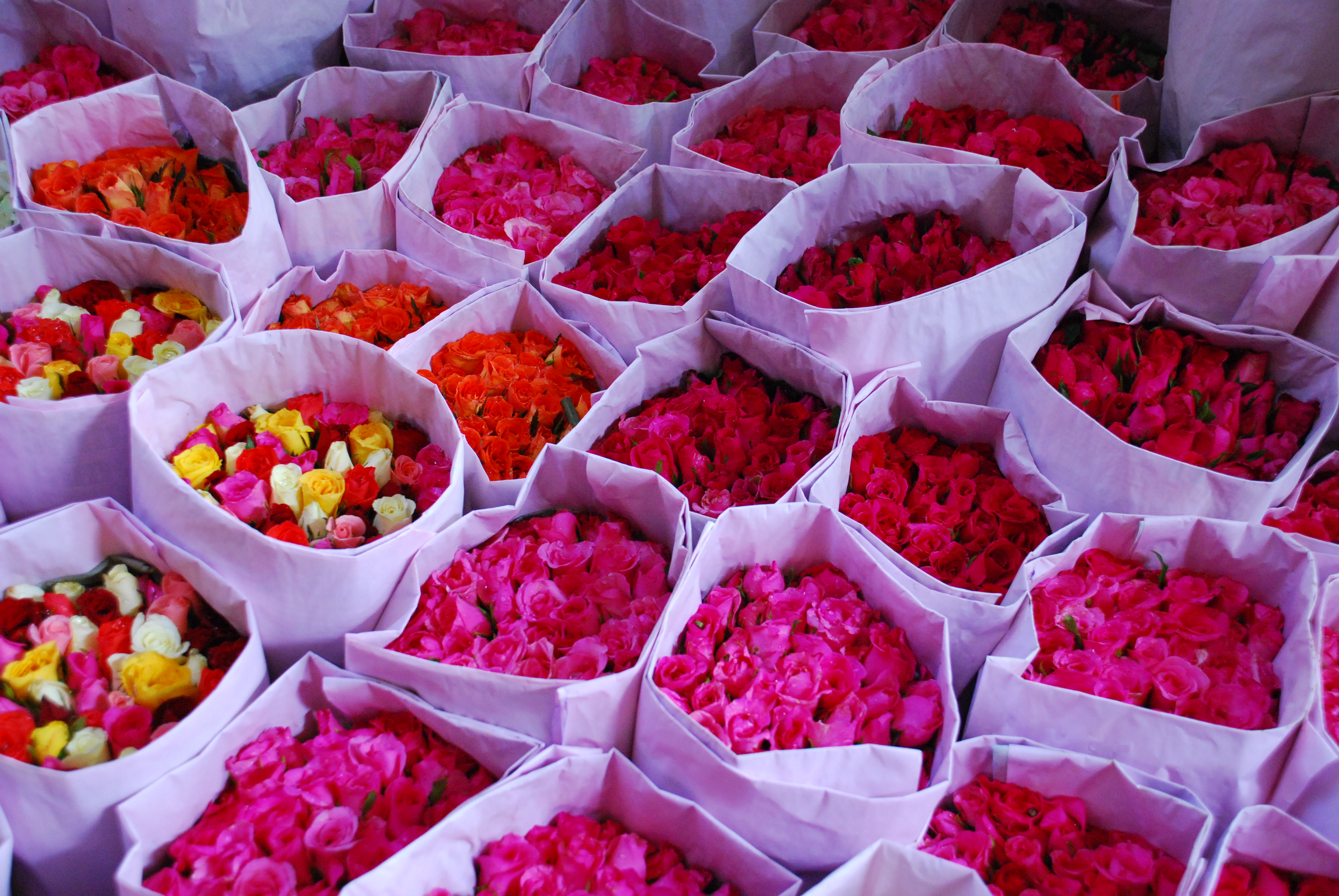 Roses in a Bangkok flower market (presumably Pak Khlong Talat)